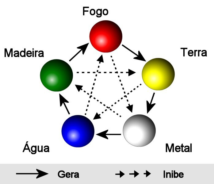 Diagrama da relação entre os cinco elementos, segundo a Medicina Tradicional Chinesa.